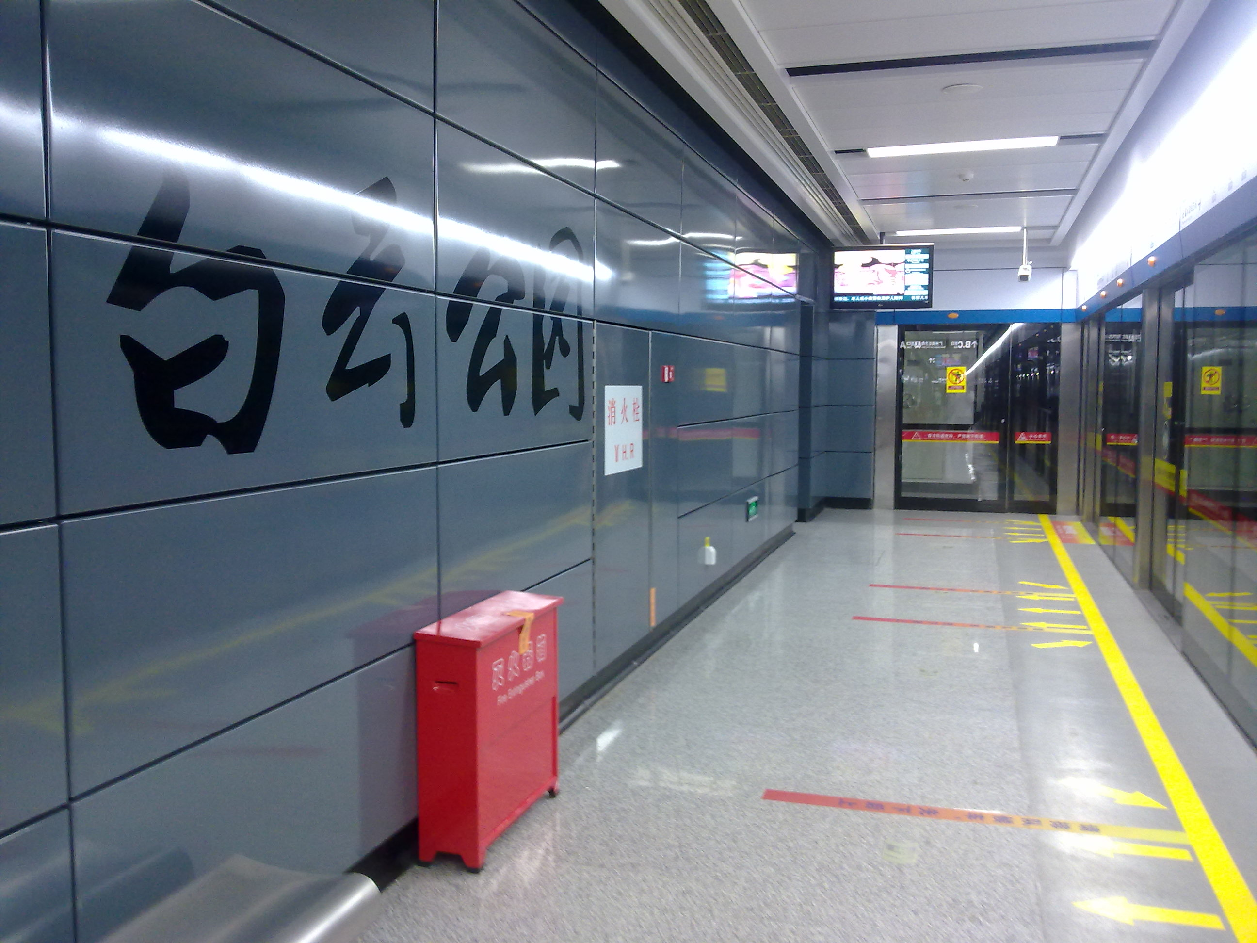 廣州地鐵白雲公園站站台